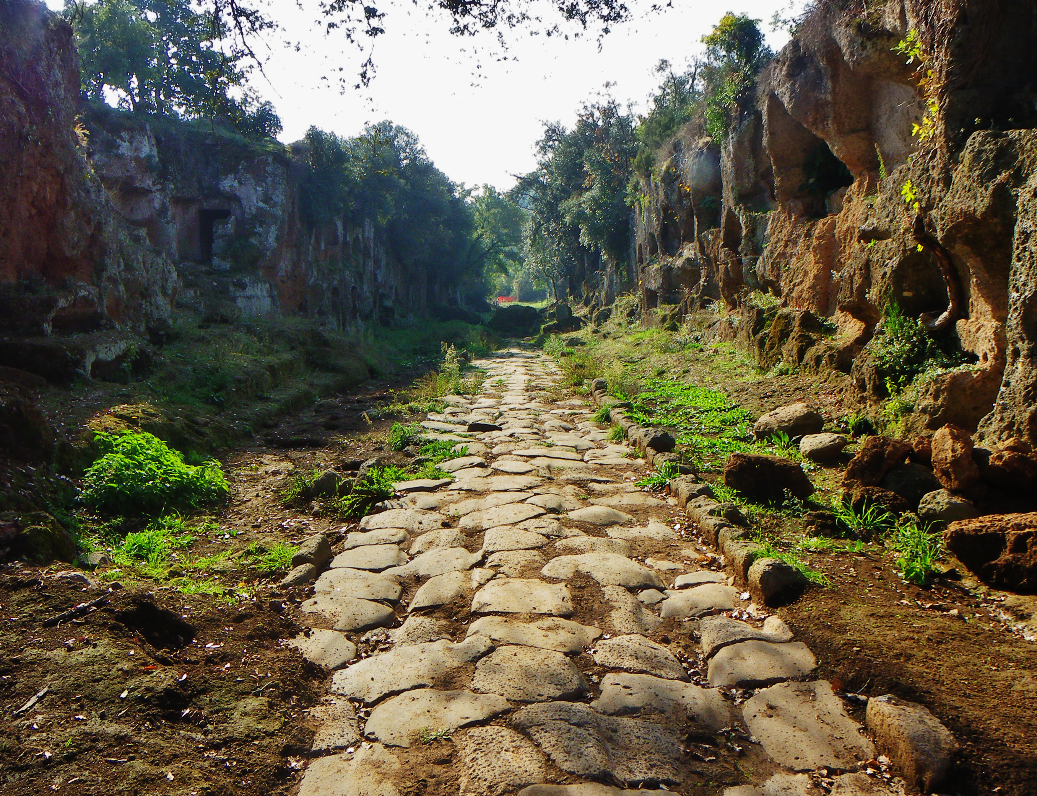 Via Amerina (VT)